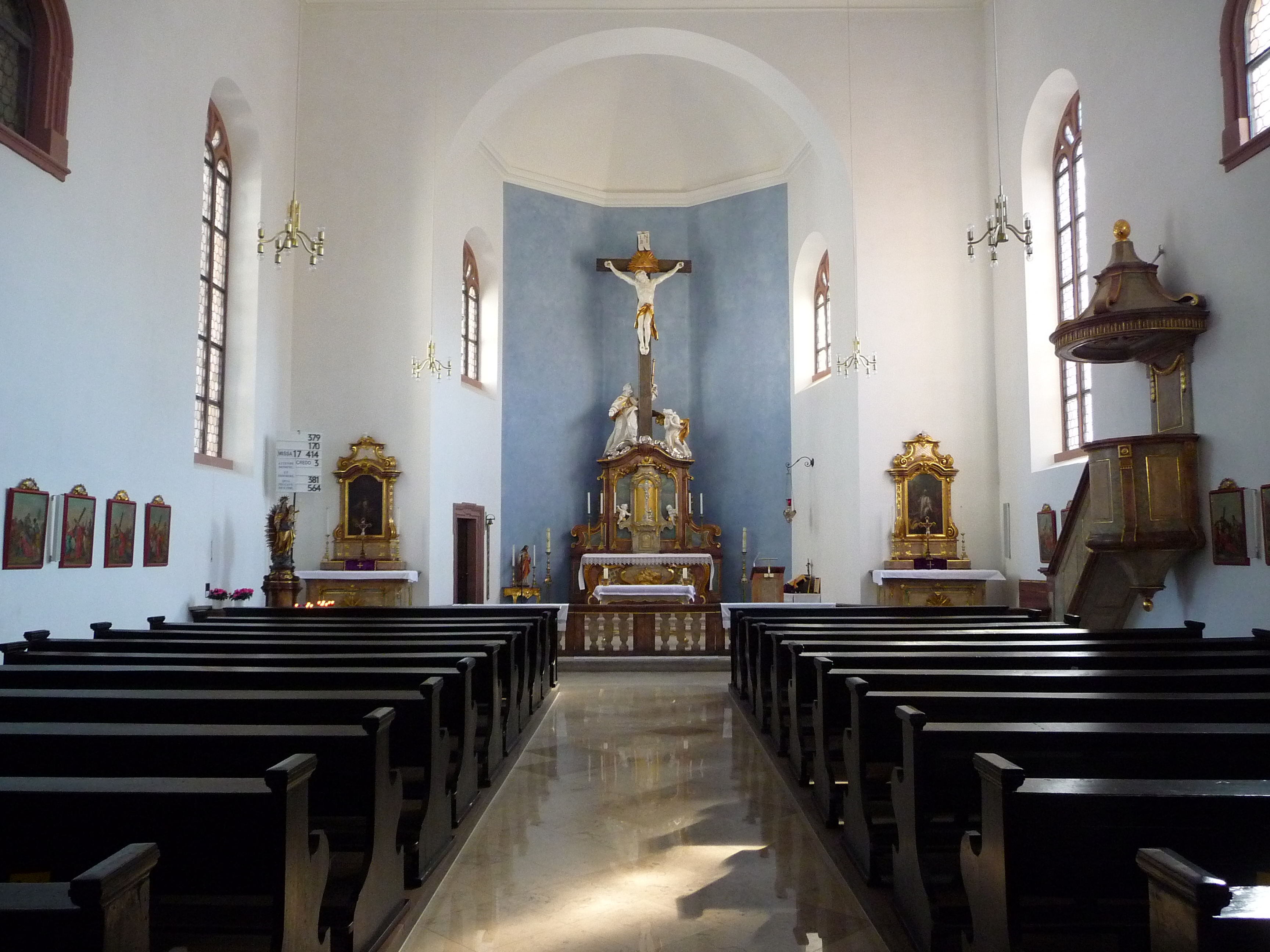 Innenraum der katholischen Kirche St. Anna in der Heidelberger Altstadt (Baden-Württemberg, Deutschland)